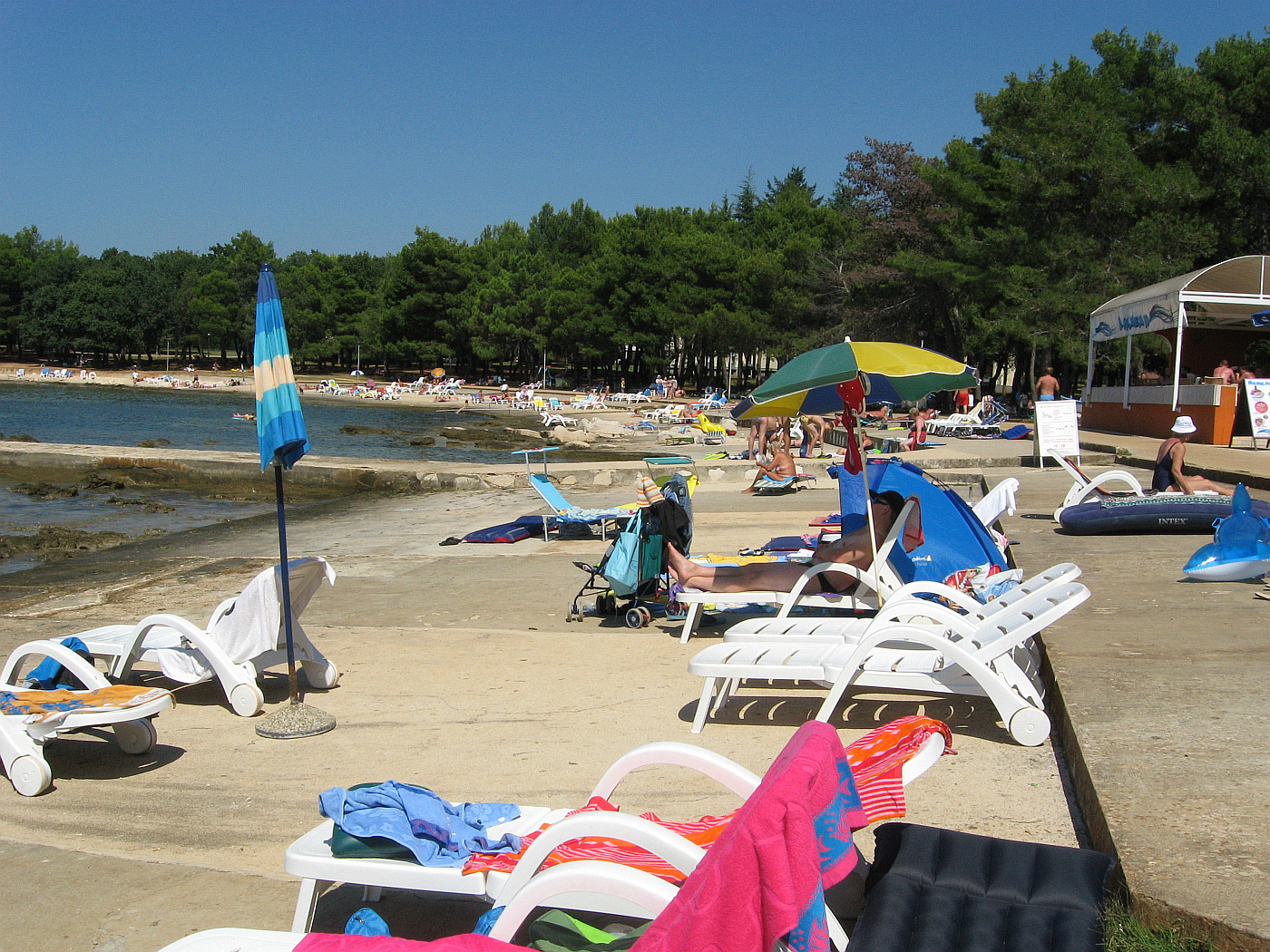 at noon - w południe.